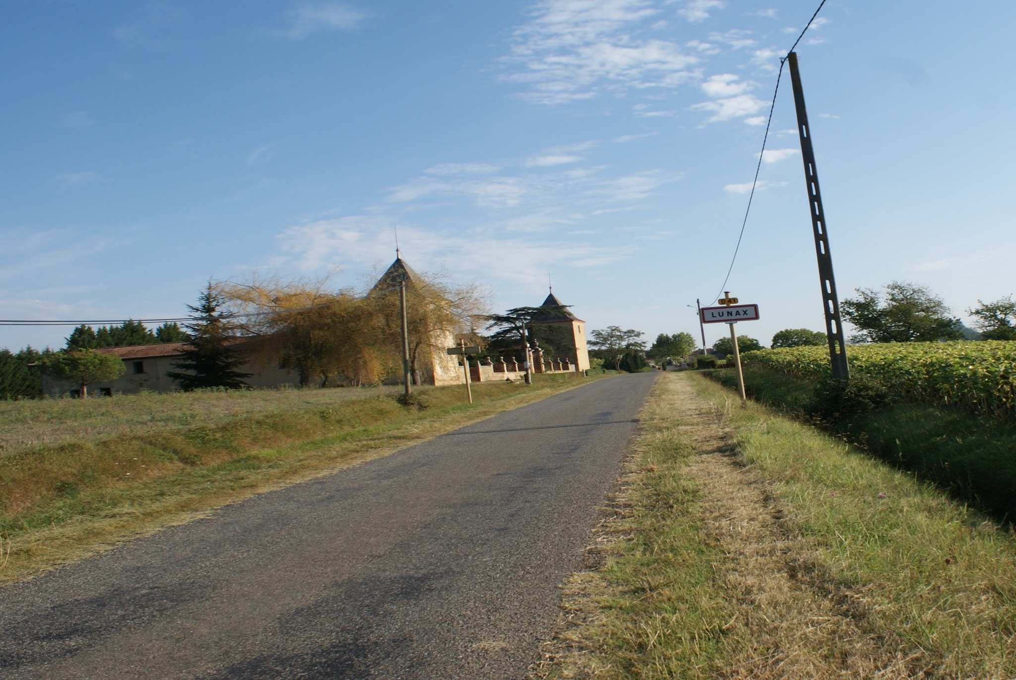 De D41 in Lunax (Haute-Garonne, Frankrijk).